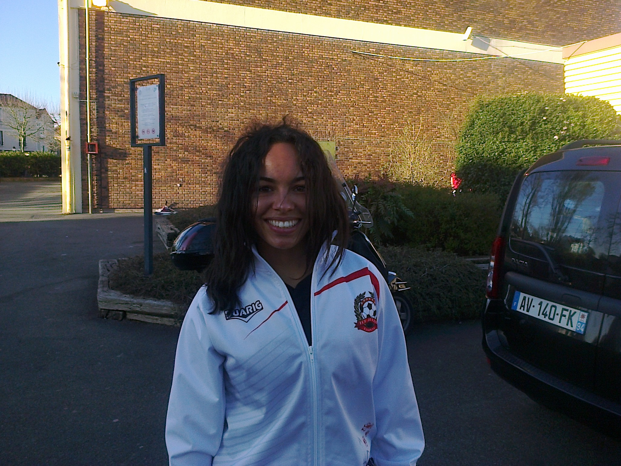 Inès Jaurena après le match VGA Saint-Maur - Juvisy FCF du 16 mars 2014